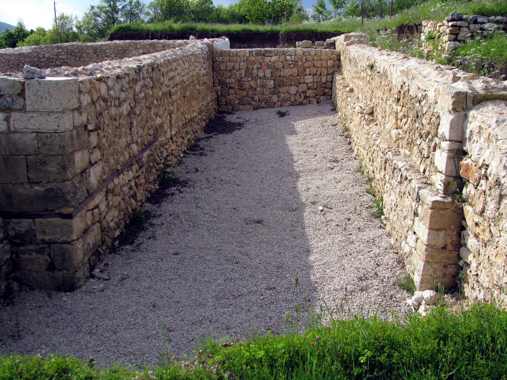 ostaci Tilurija, rimskog logora na brdu Gardun iznad Trilja